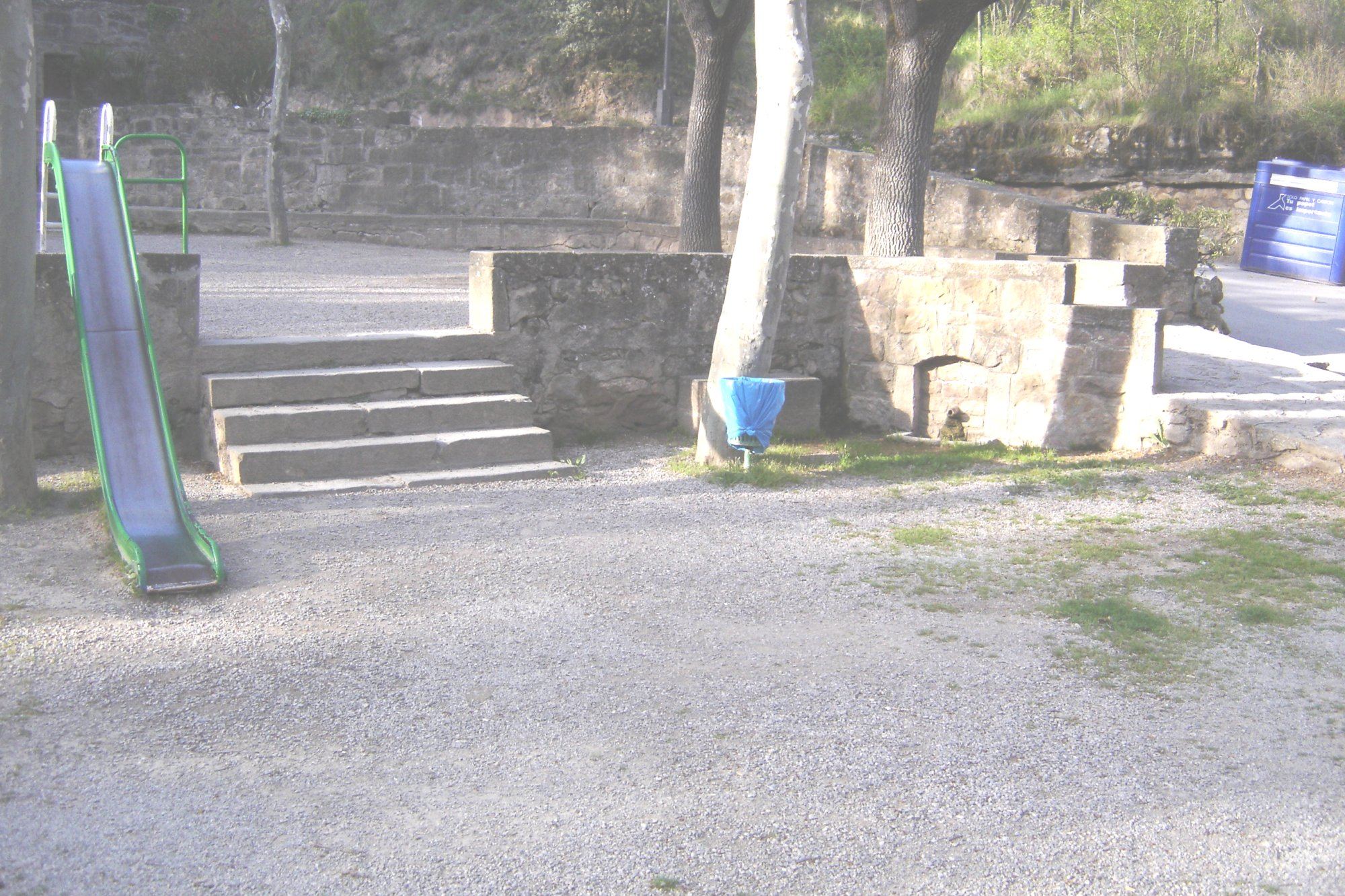 La font canalitzada de la Mare de la Font, al municipi de Solsona (Solsonès)